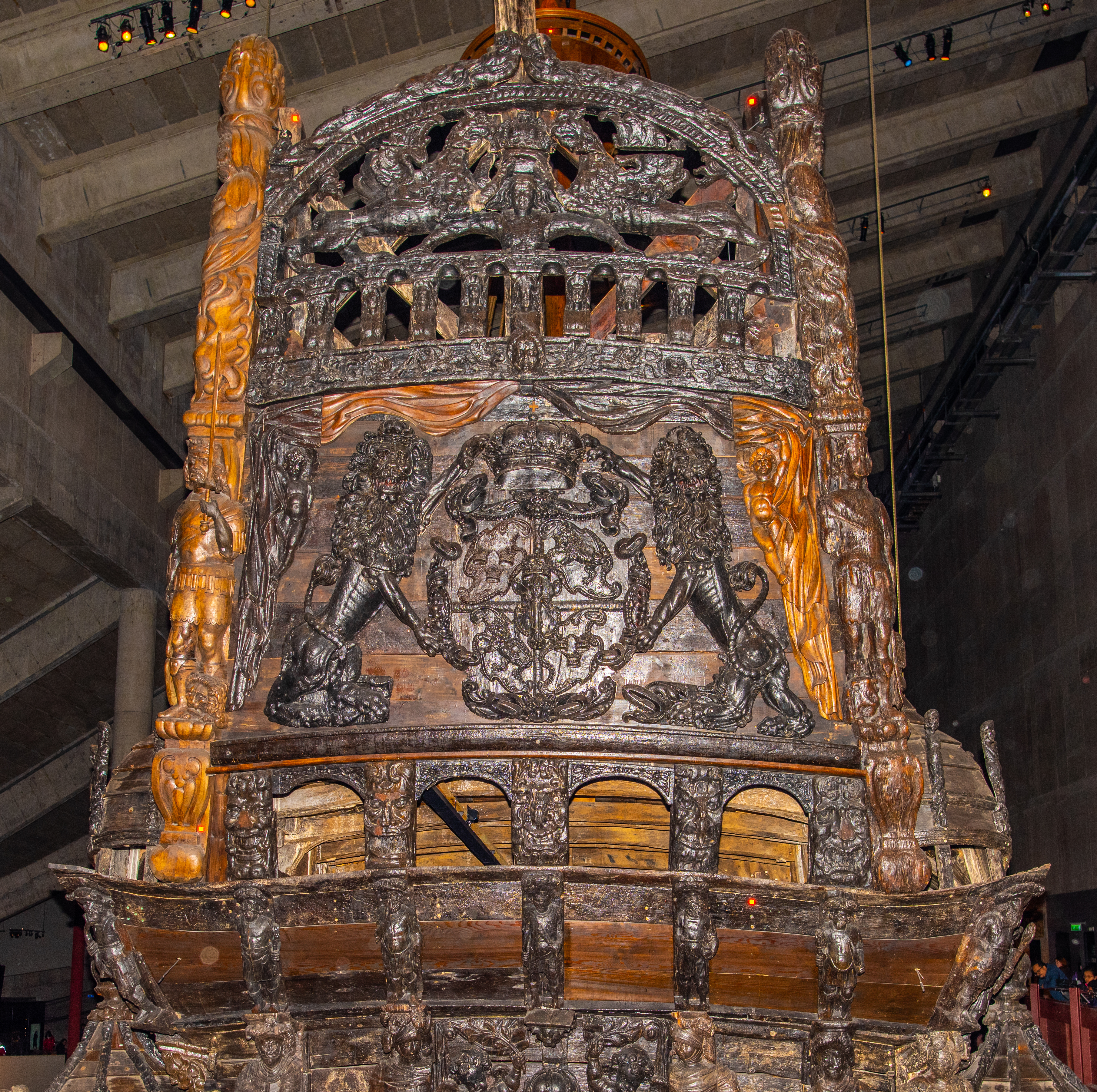 Vasa Museum, Stockholm, Sweden, December 2018